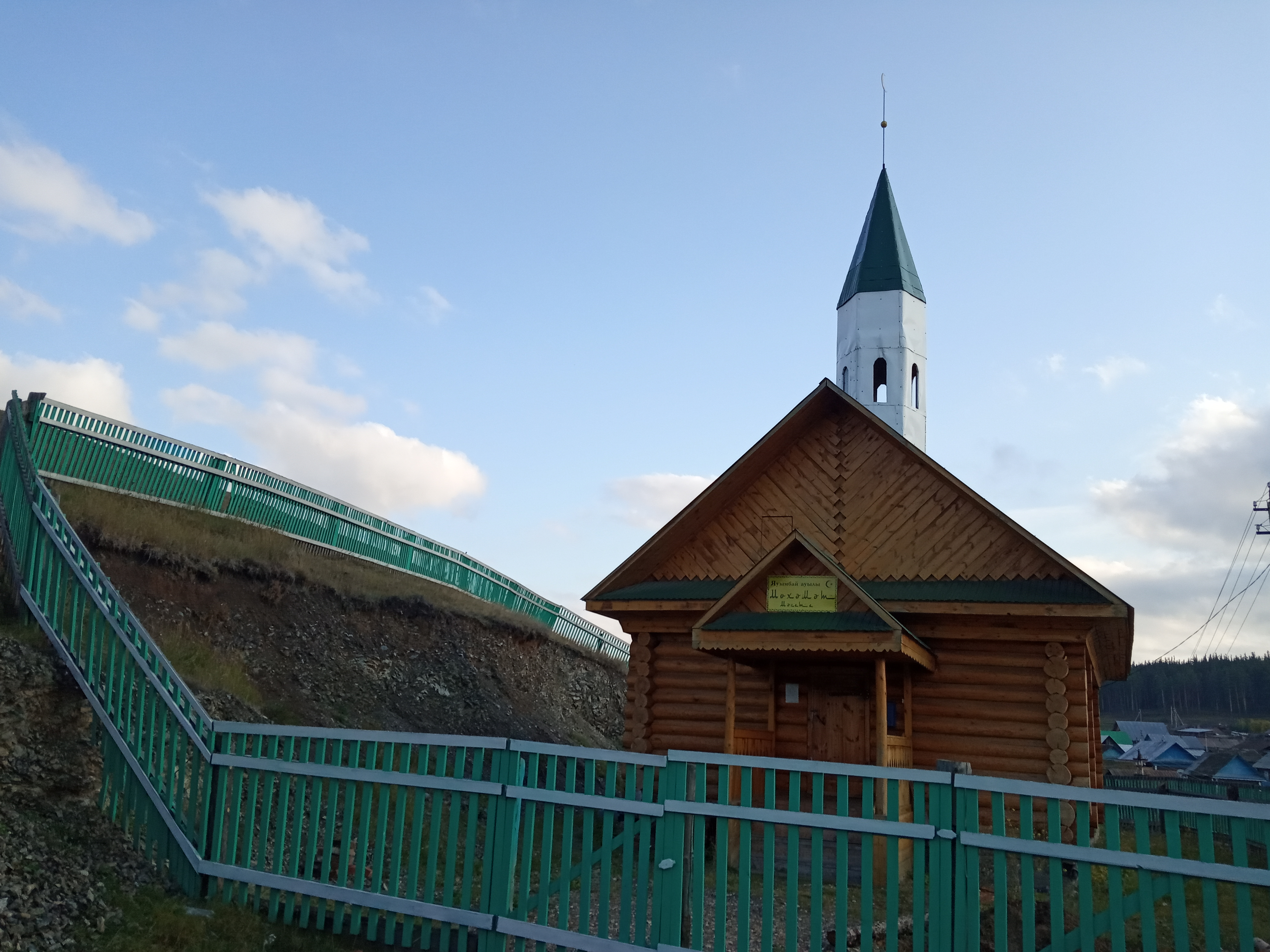 Бурзянский район, дер.Яумбаево.Деревенская мечеть.